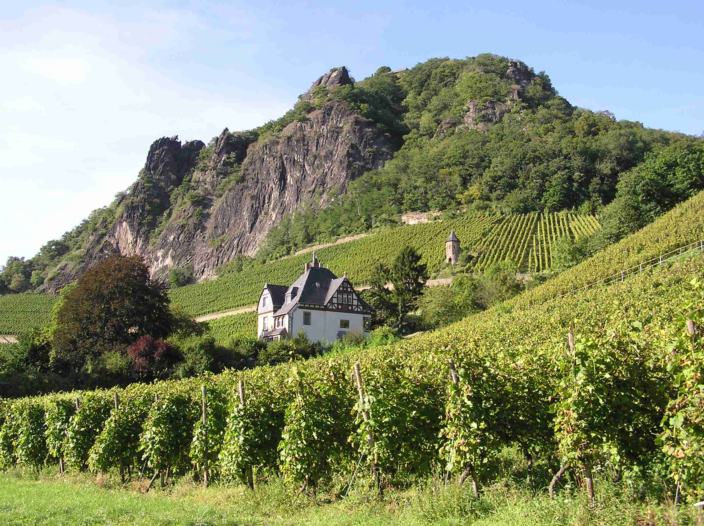 Weinberge in Rhöndorf (Bad Honnef)